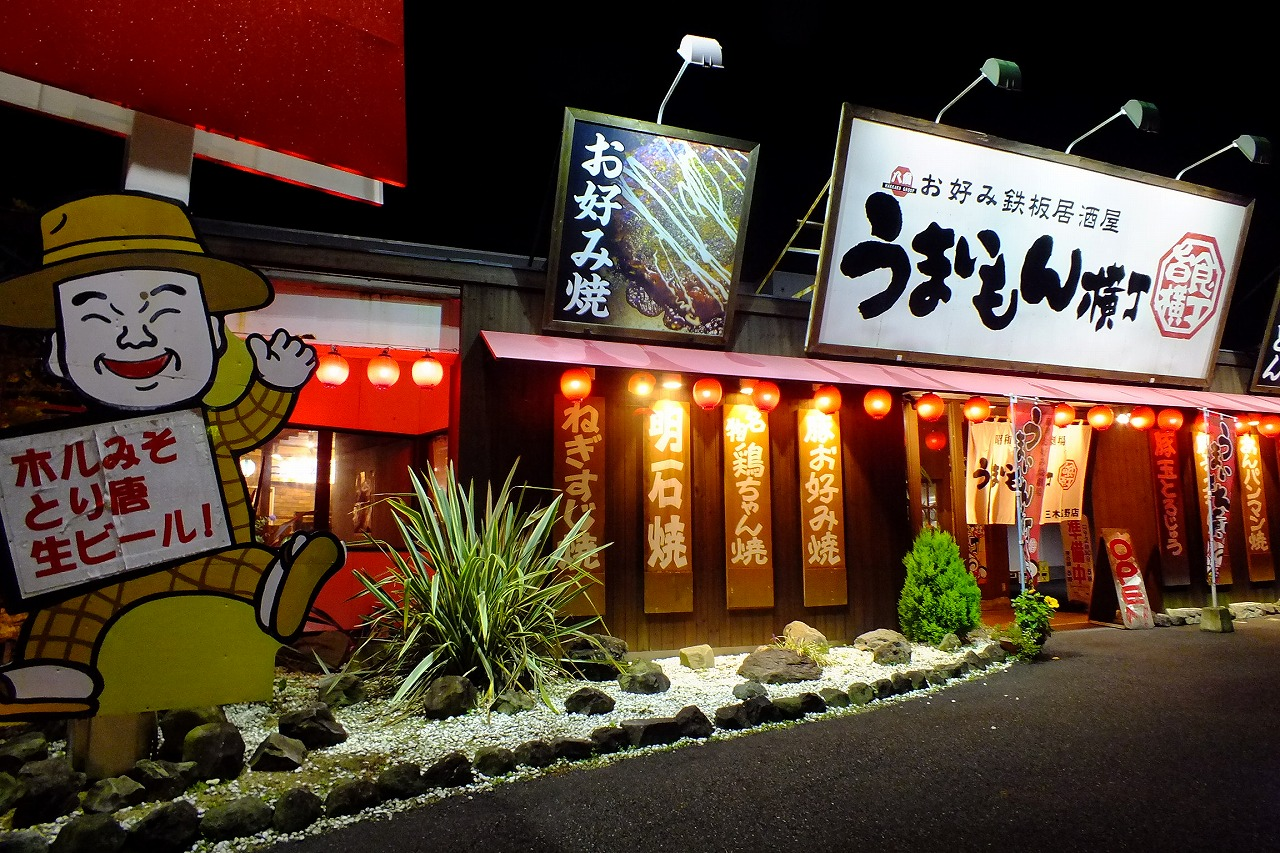 うまいもん横丁三木店